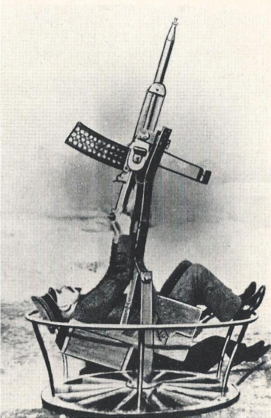 Becker Flab 1917